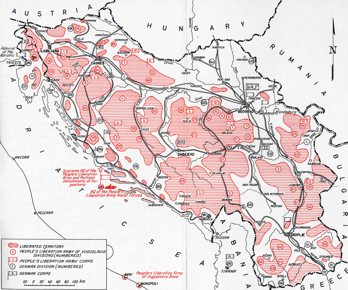 Teritorij pod nadzorom NOVJ u rujnu 1944.